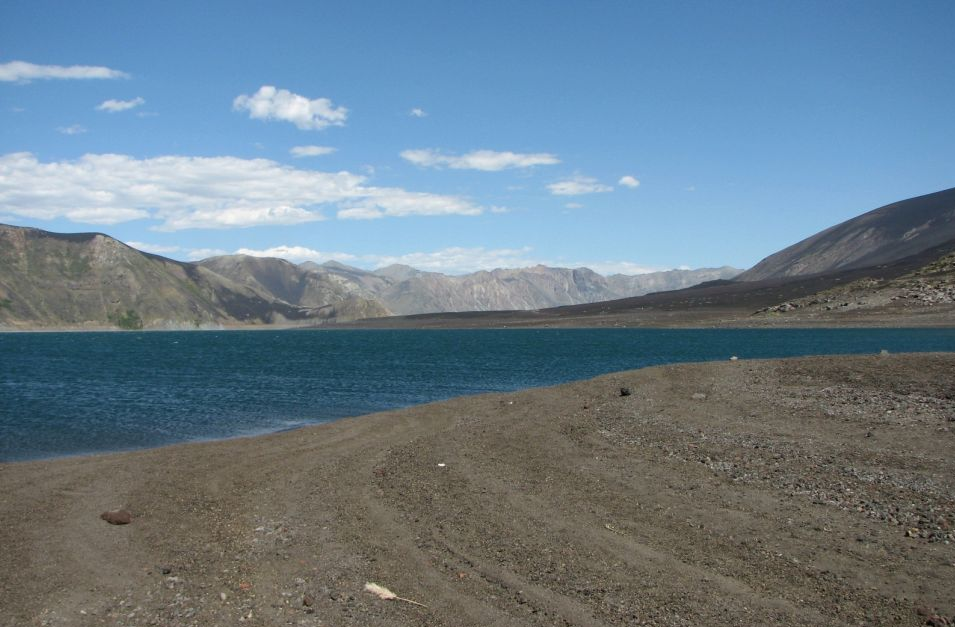 Laguna del Laja, Chile